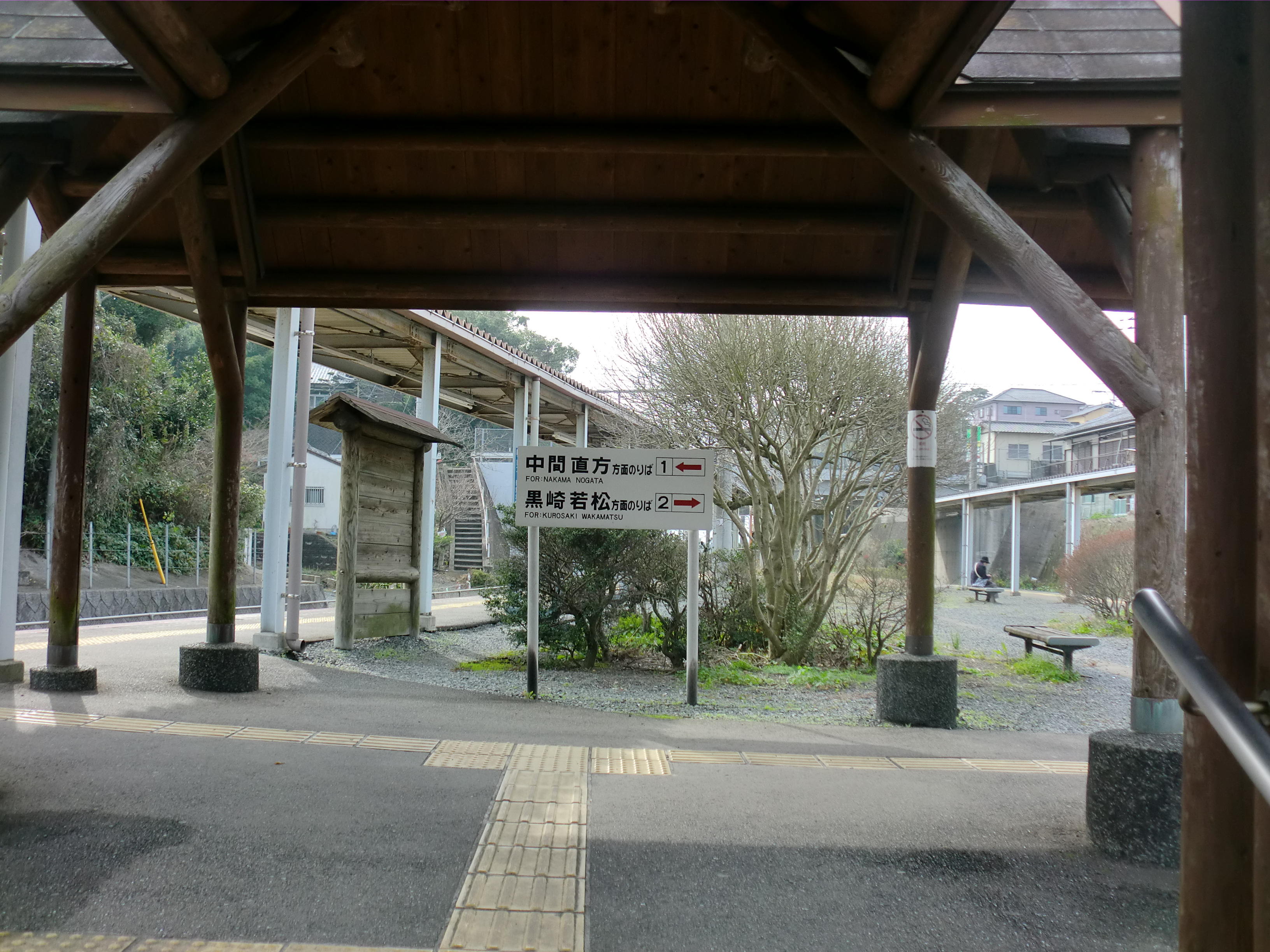 福岡県遠賀郡水巻町にある東水巻駅ホーム